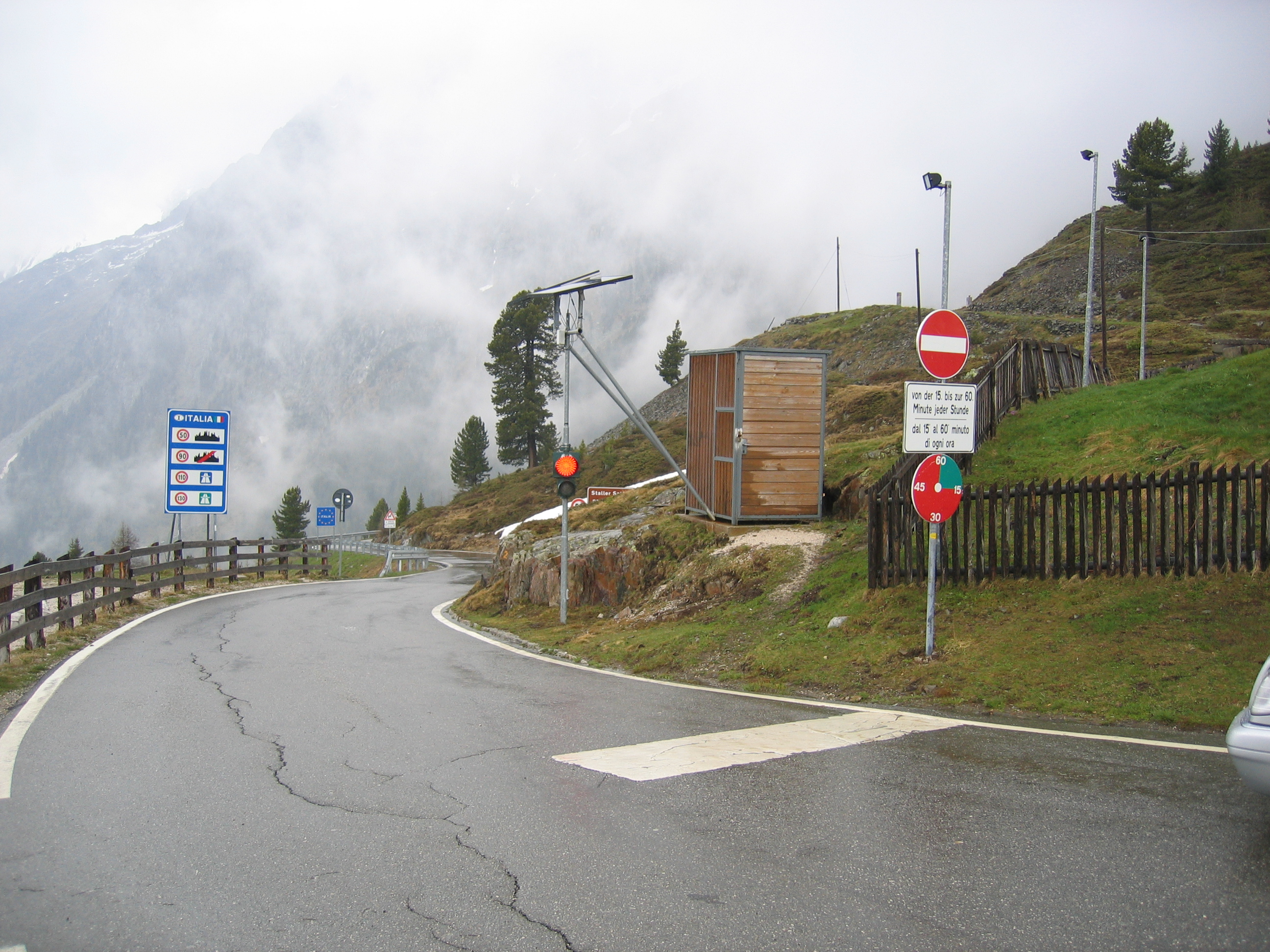 Staller Sattel, Grenzübergang von Österreich (Defereggental) nach Italien (Antholzer Tal)